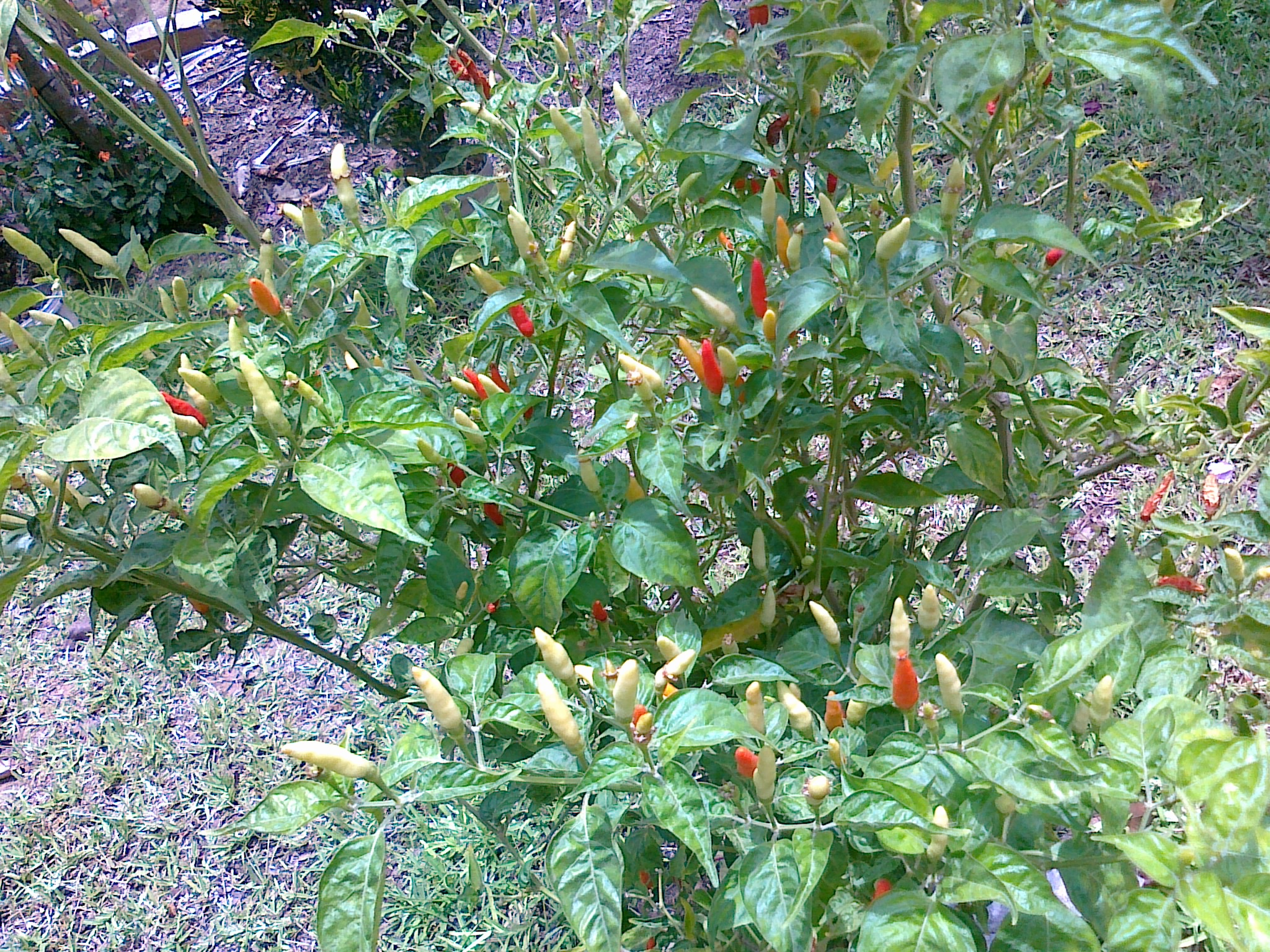 மிளகாய் செடி